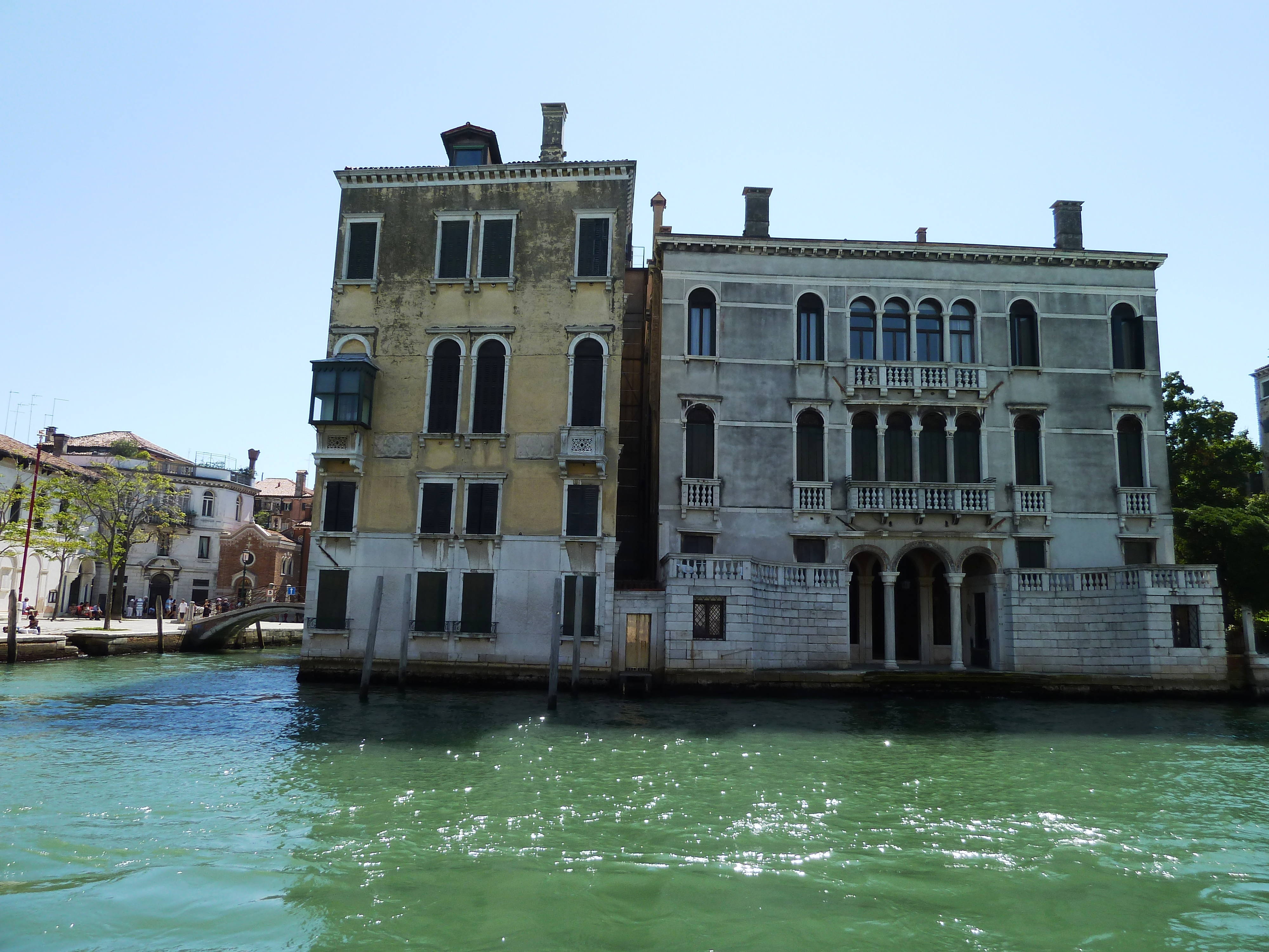 pal loredan cini et molin balbi valier